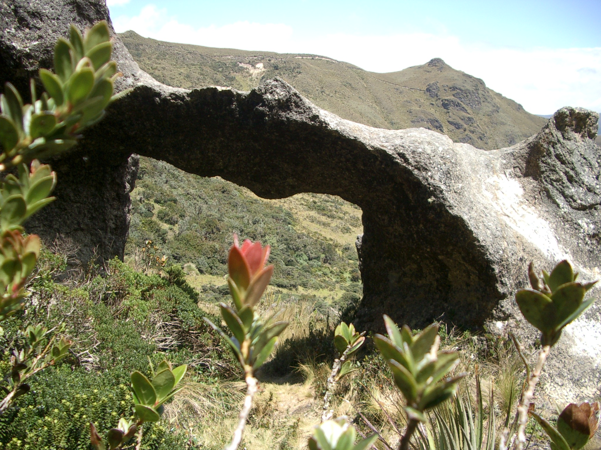 Arch at Cerro de Arcos, Ecuador